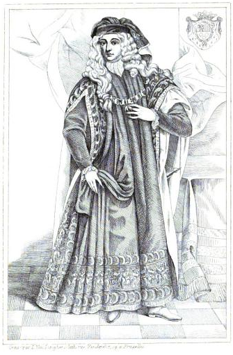 Philippe-François de Glymes, prince de Berghes (1646-1704)